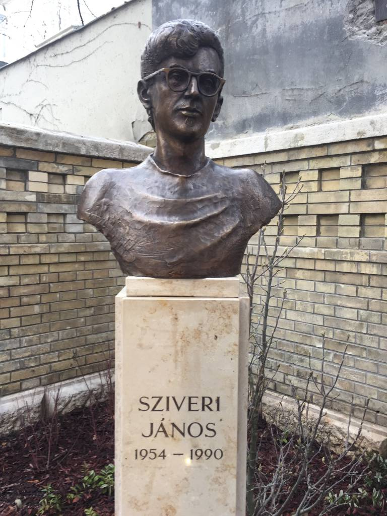 Sziveri János mellszobra Budapesten, a Benczúr utca 45. szám alatt (Kertész Imre Intézet)